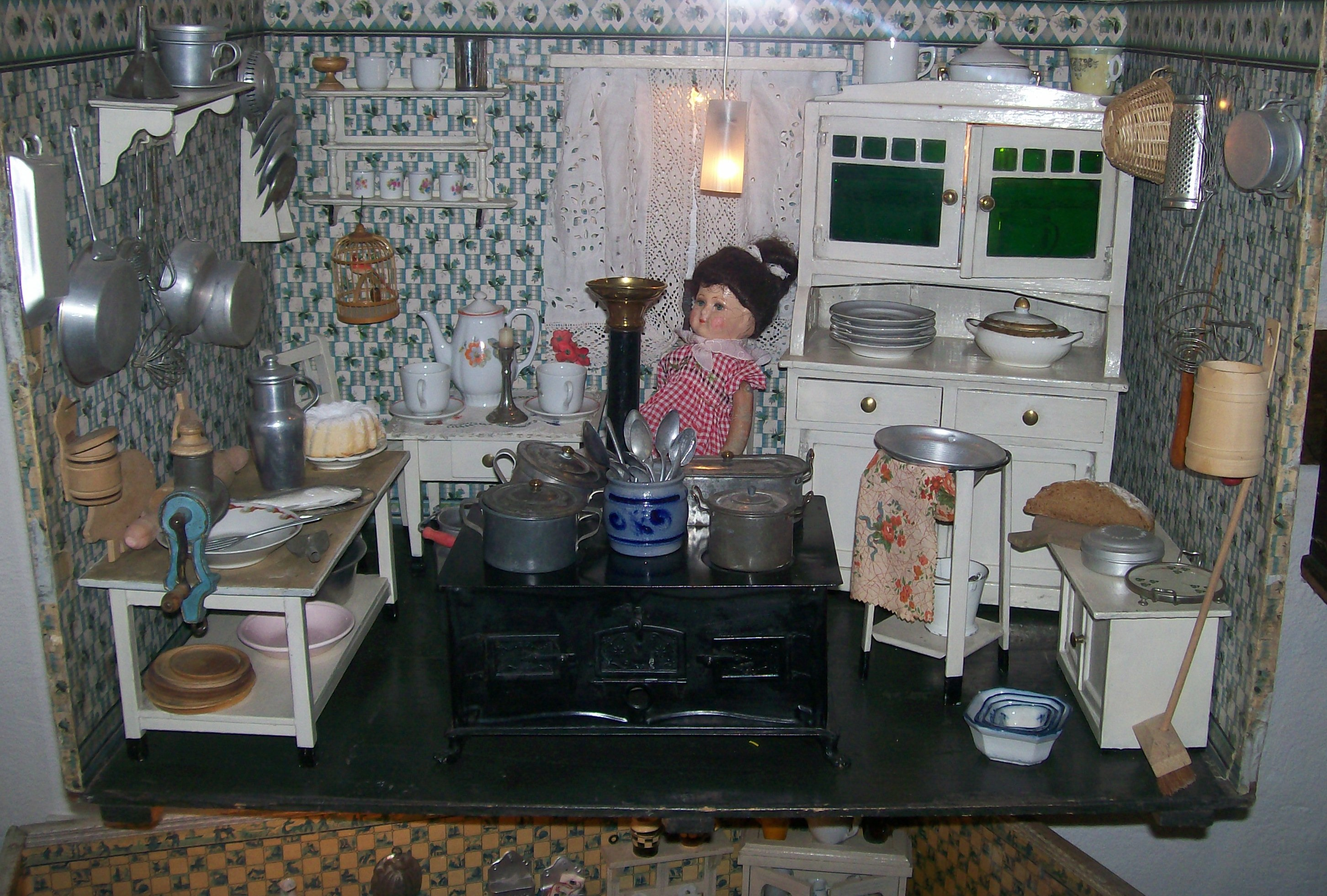 Alsfelder Märchenhaus mit Puppenstuben-Etage.